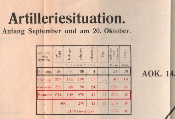 12. Isonzoschlacht: Artilleriesituation Anfang September und am 20. Oktober 1917